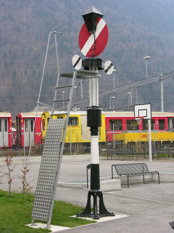 Hippsche Wendescheibe aufgestellt in Chur zwischen Segantinistrasse und Güterbahnhof. Sichtbar ist die Vorderseite.